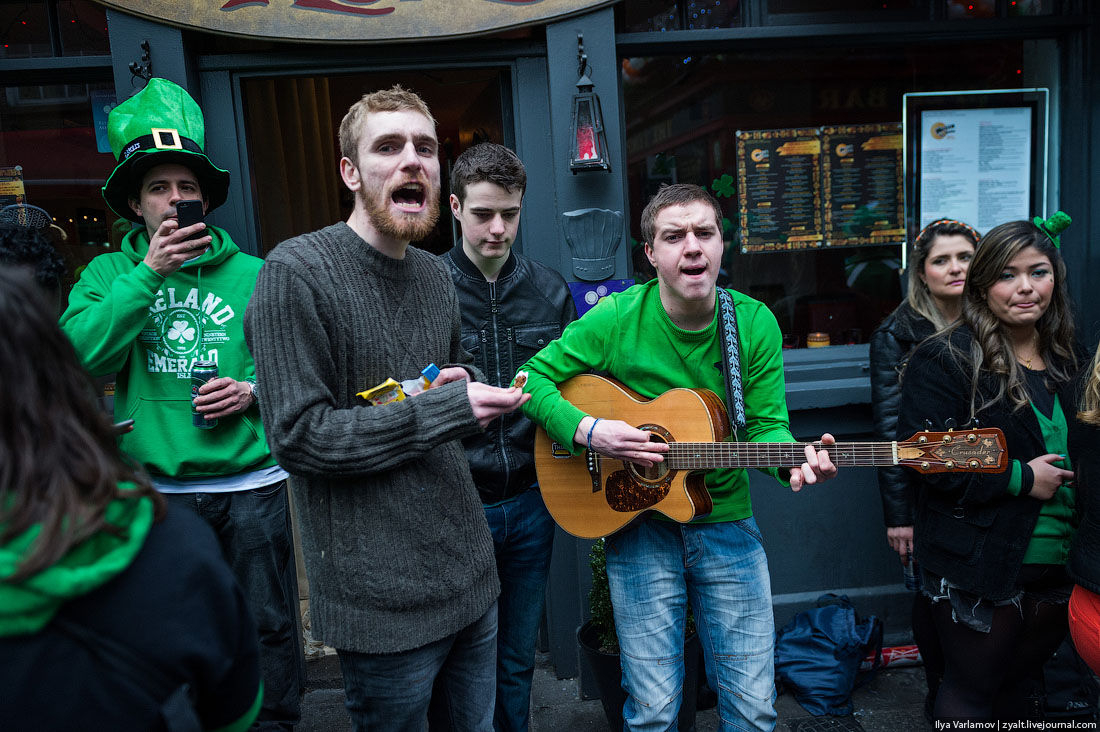 дублин день патрика